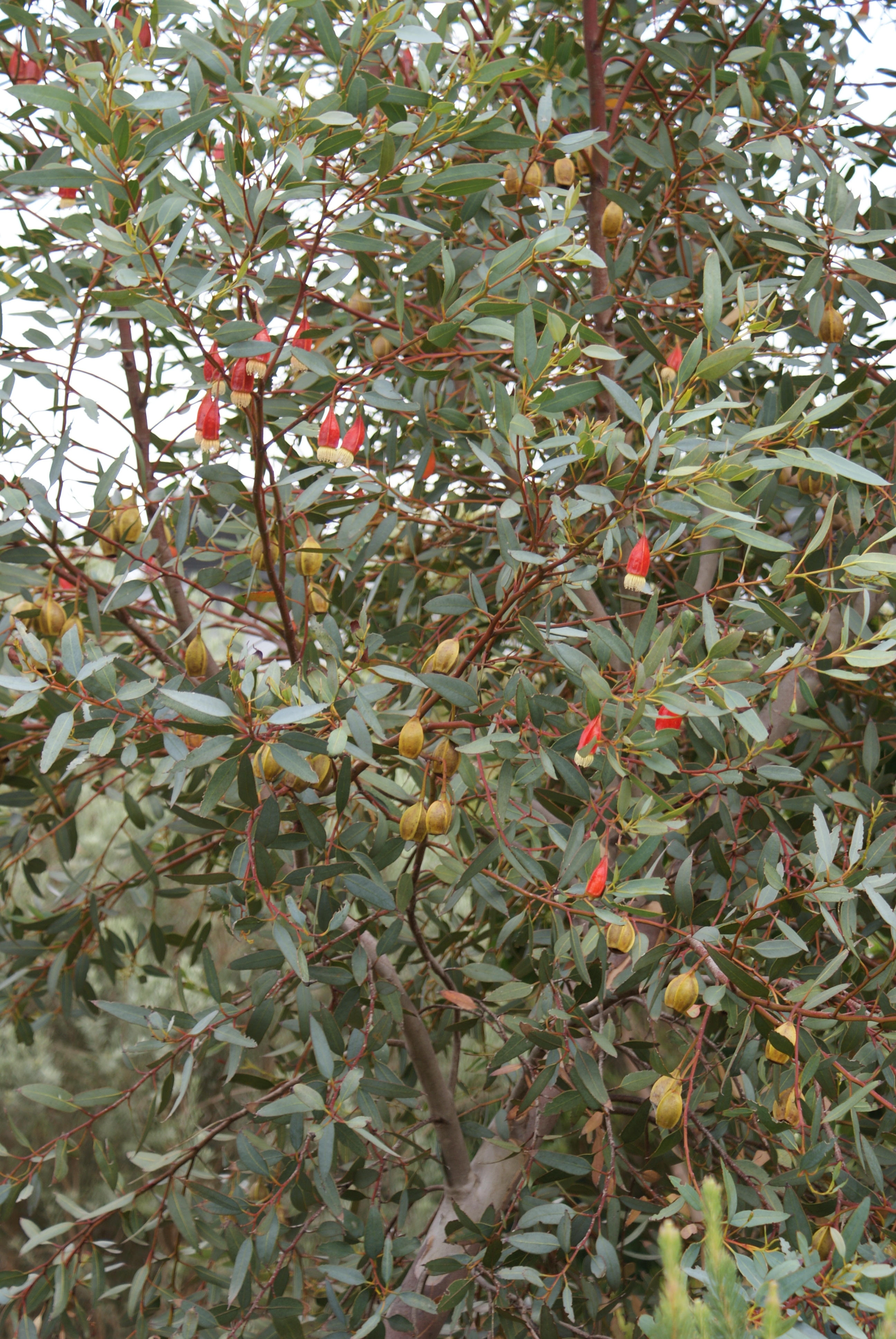 Best viewed All sizes